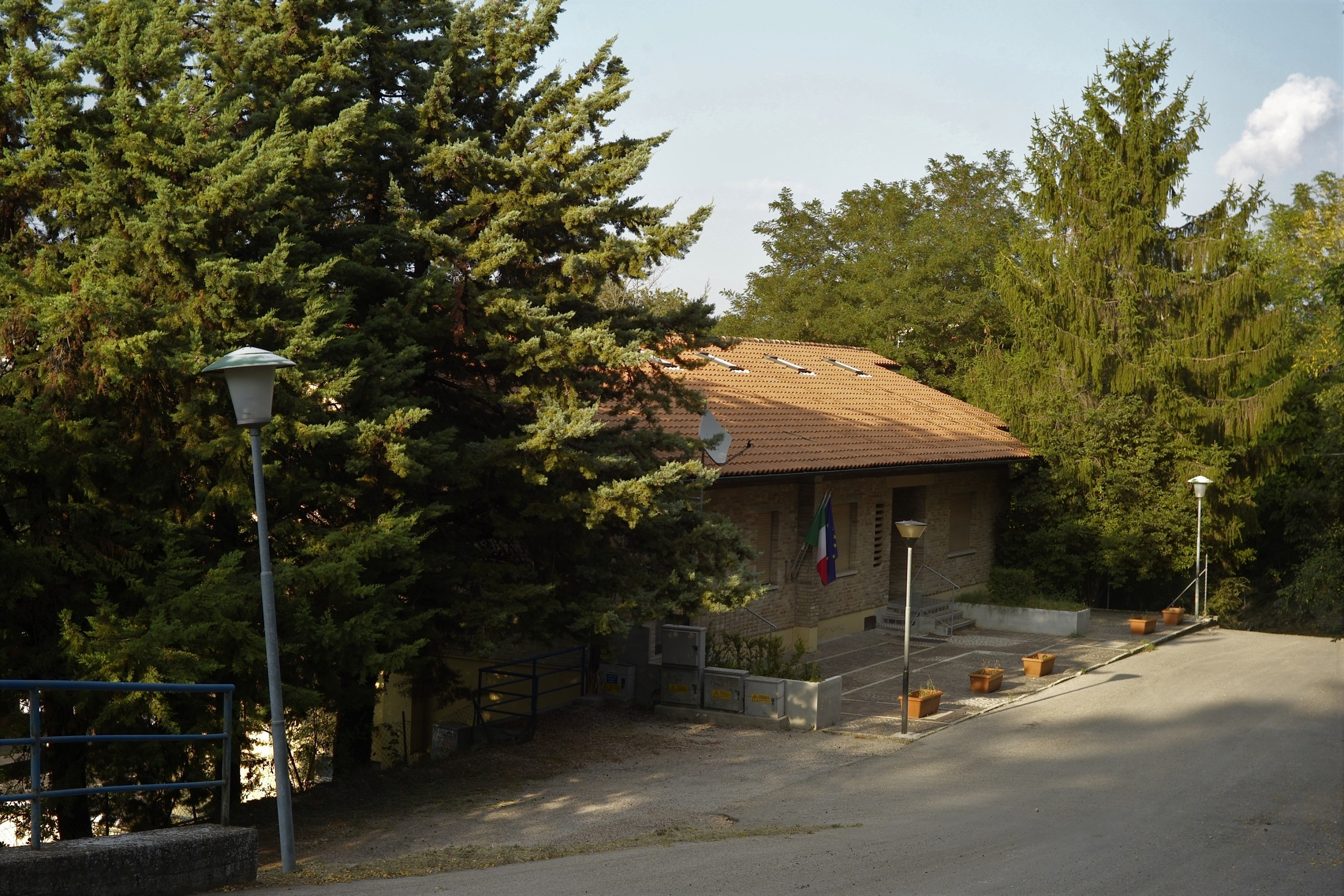 Veduta esterna della facciata principale della Scuola Primaria di Mazzaferro di Urbino.